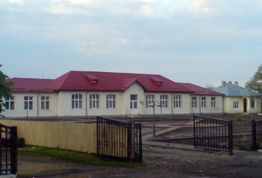 Şcoala generală nr 1 din satul Bordei Verde, judeţul Brăila în timpul renovării din 2012